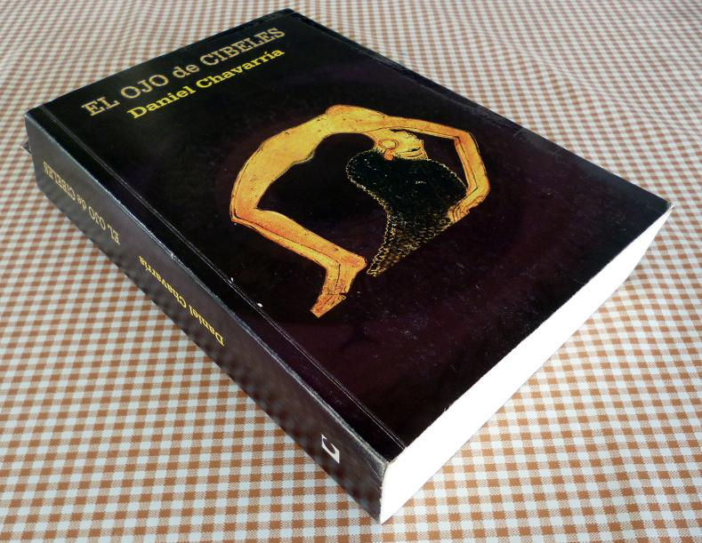 Fotografía de la novela El ojo de Cibeles para ser utilizada en el artículo del mismo nombre